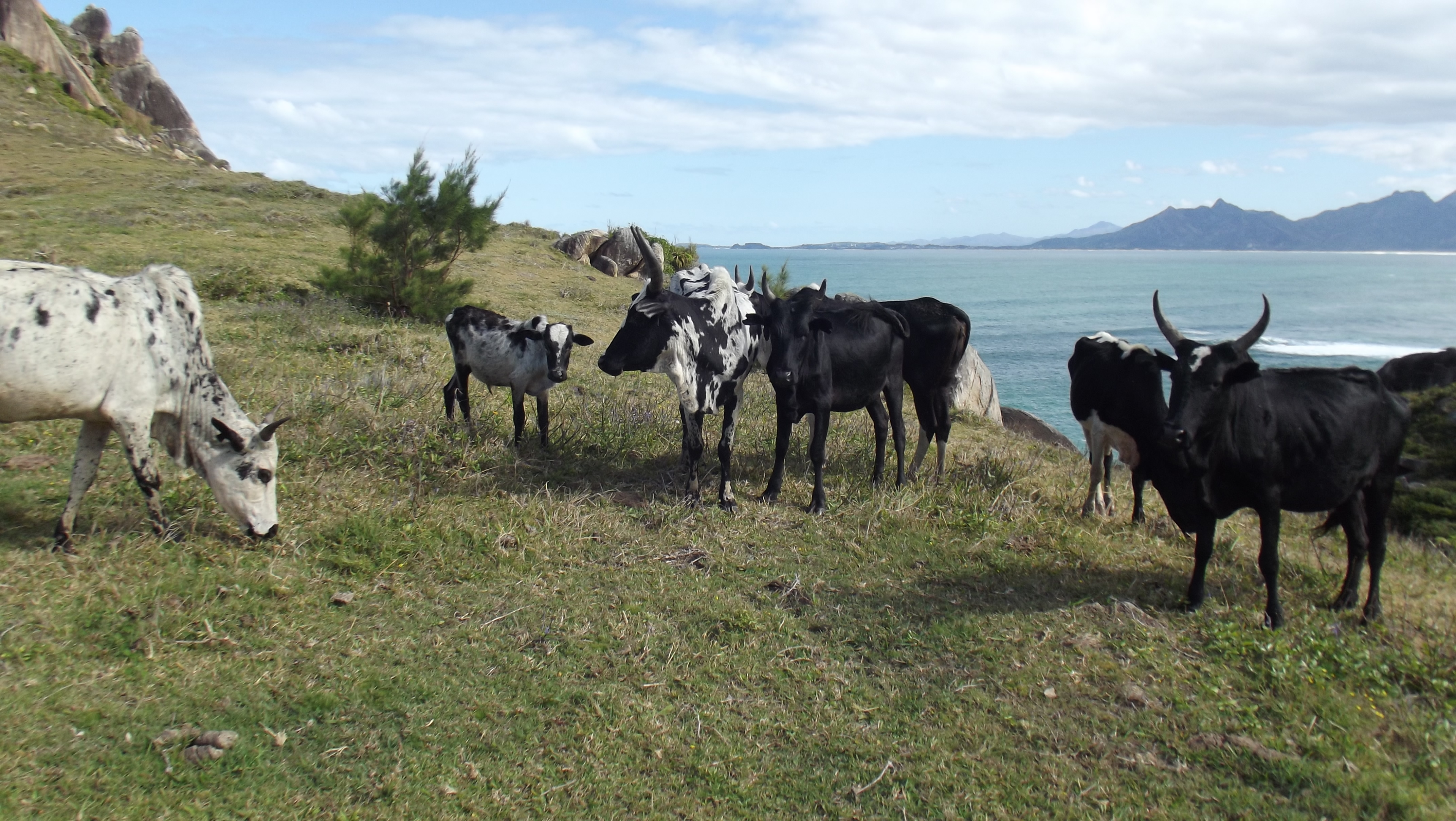 Zebu's in de buurt van kaap Evatra